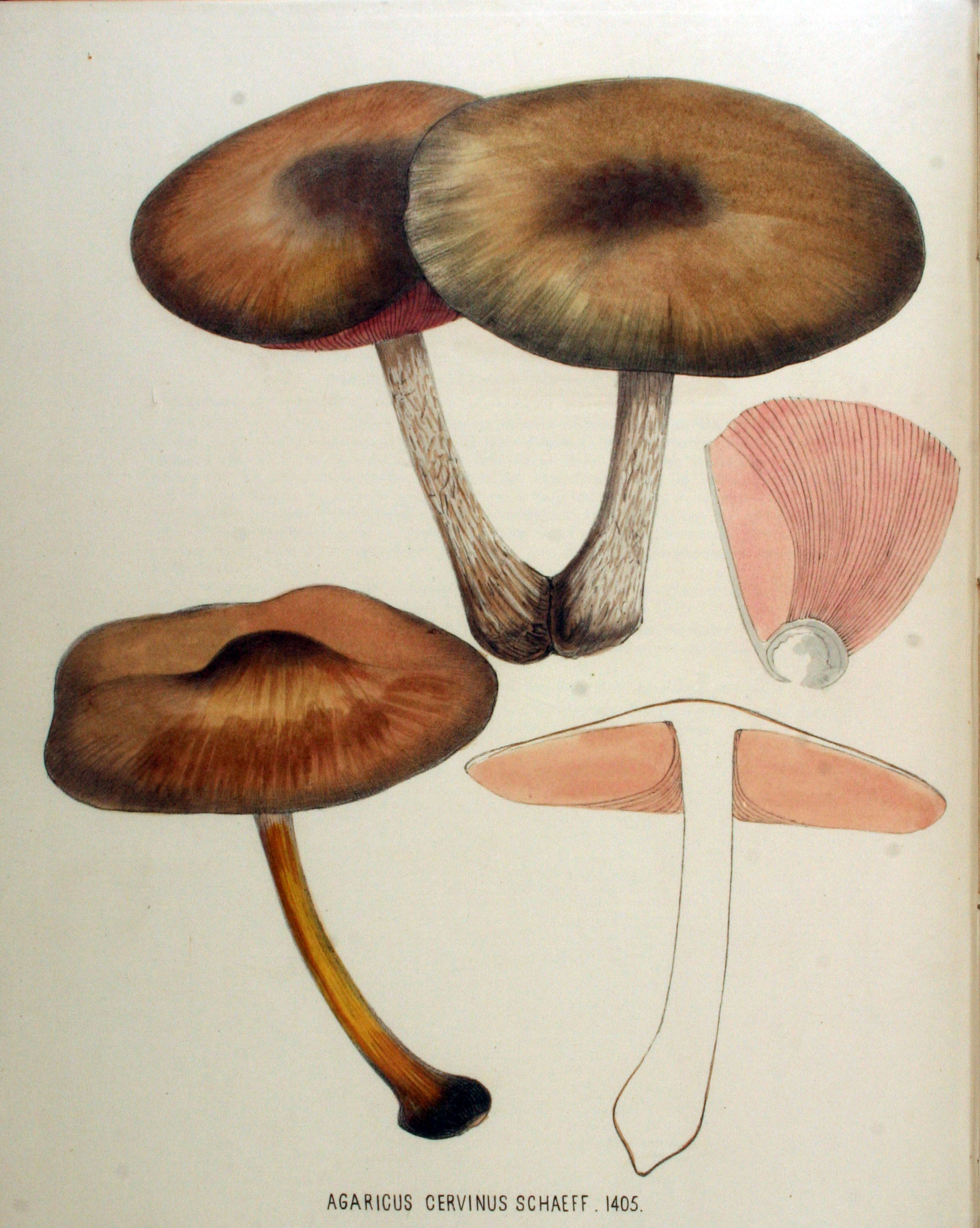 Agaricus cervinus